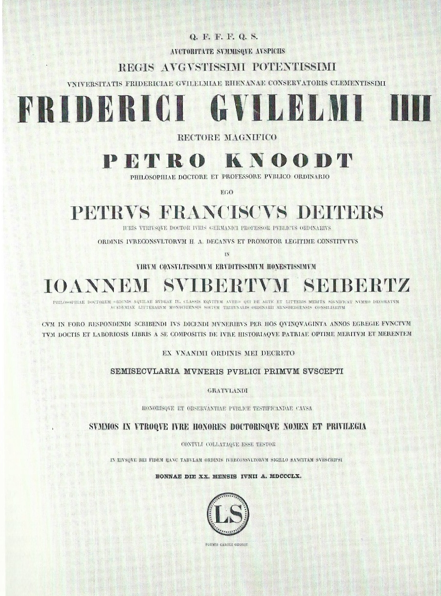 Johann Suibert Seibertz Ehrendoktordiplom der Juristischen Fakultät der Universität Bonn